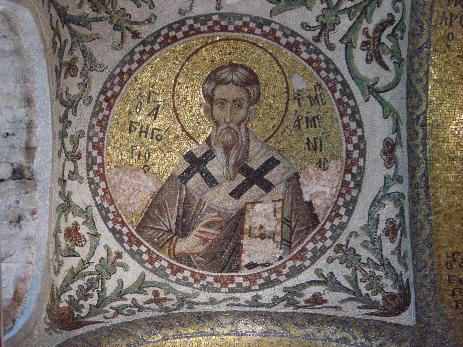 Istanbul: Museo dell'ex chiesa del Pammacaristos (Fetiye camii). Soffitto con mosaico bizantino del XIV secolo rappresentante San Gregorio Armeno. Foto di: Giovanni Dall'Orto, 26-5-2006.